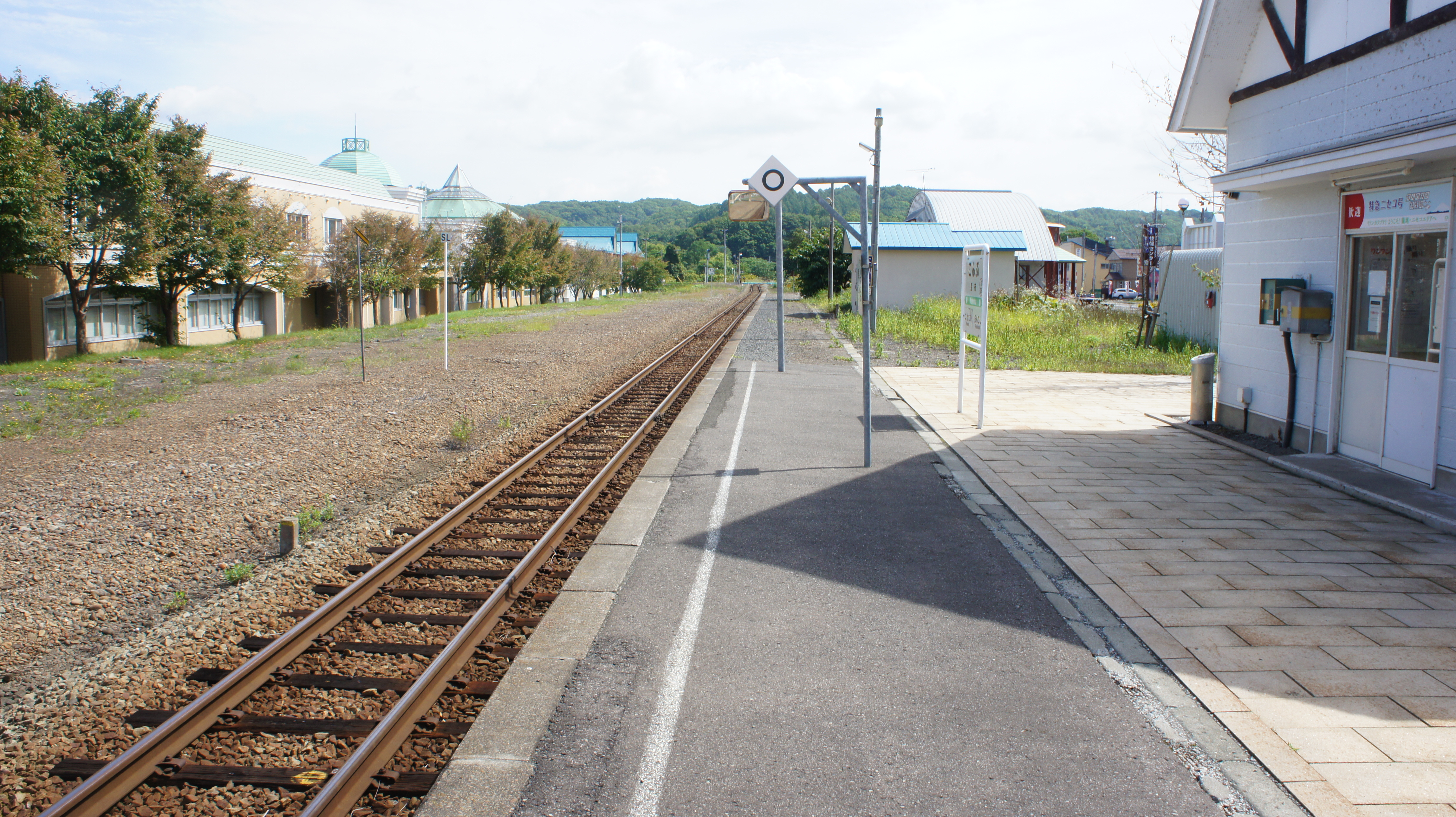 JR函館本線・昆布駅のホーム Sony NEX-3